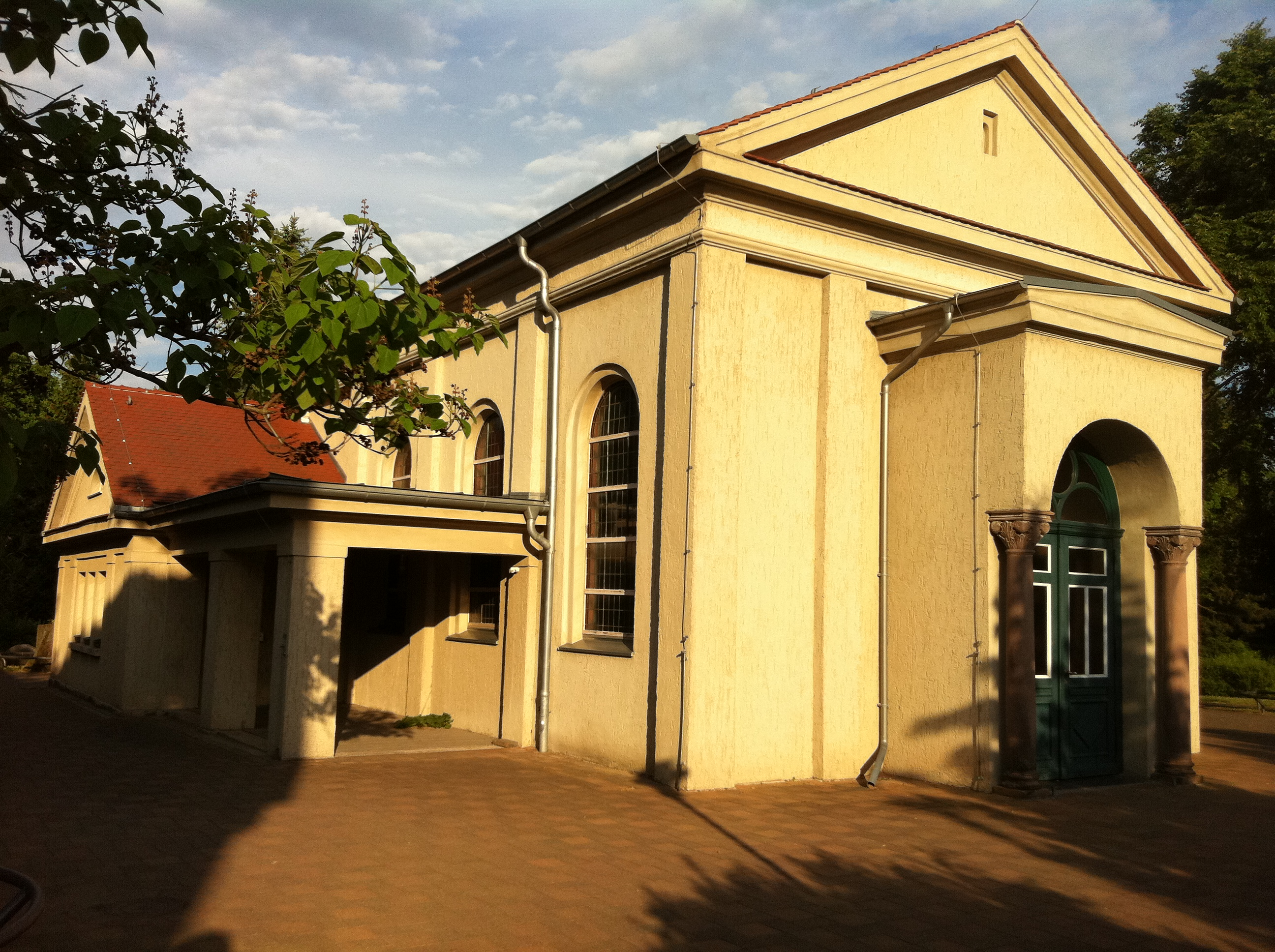 Aussegnungshalle des Nordfriedhofes in Halle Saale